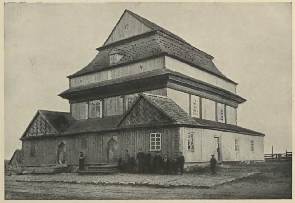 Materiały z wystawy Architektury Polskiej, urządzonej w 1915 r. staraniem Koła Architektów i Towarzystwa Opieki nad Zabytkami Przeszłości w Warszawie.